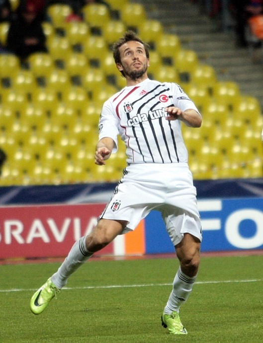 Tomáš Sivok, 2009-10 sezonunda Beşiktaş formasıyla.